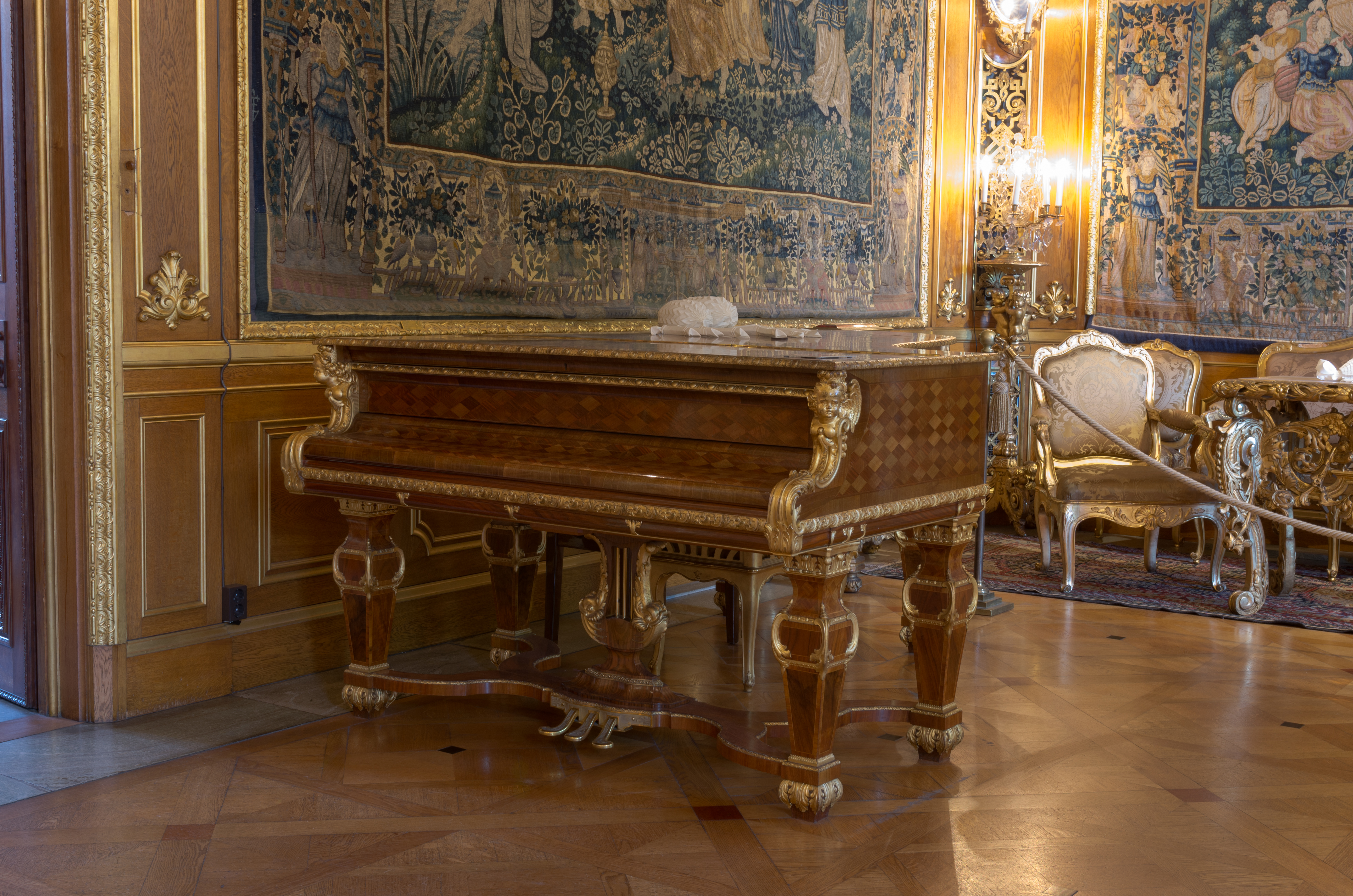 Flygel i Hallwylska museets stora salong. Byggd i New York 1896 av Steinway & Sons. Fodral utformat av Isak Gustaf Clason och utfört av snickaren Carl Herman Benckert. Inventarienummer: VI:I:C.a.01.